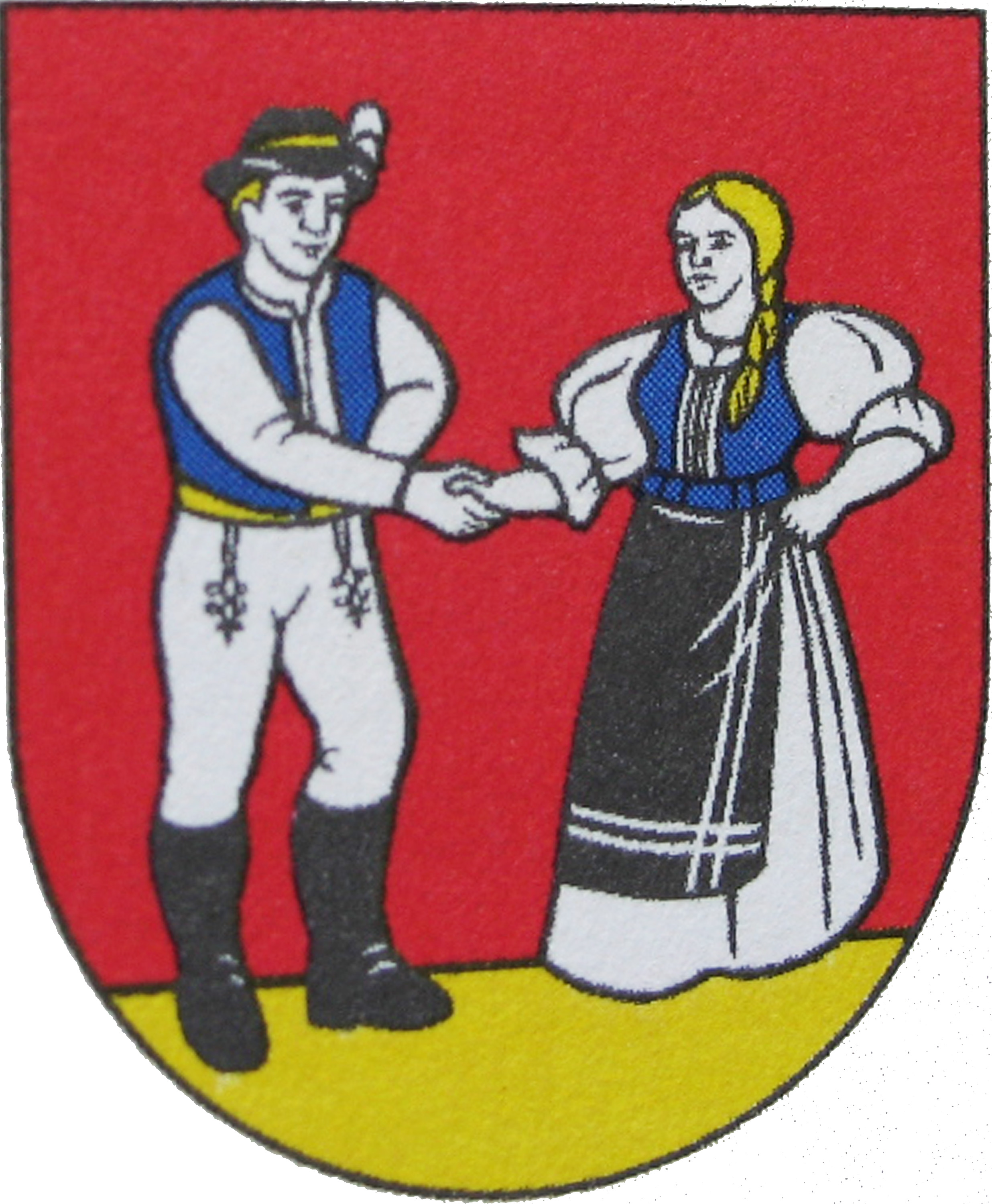 Erb obce Ladomirová (HR: ?): V červenom štíte na zlatej pažiti sú dve stojace k sebe pootočené postavy. Držia sa za ruku na pravej strane je strebroodetý muž v modrej veste, čiernych čižmách a strieborným perom ozdobenom čiernom klobúku. Na ľavej strane je zlatovlasá žena so zlatým vrkočom, v strieborných šatách, modrom živôtiku a čiernej zástere.